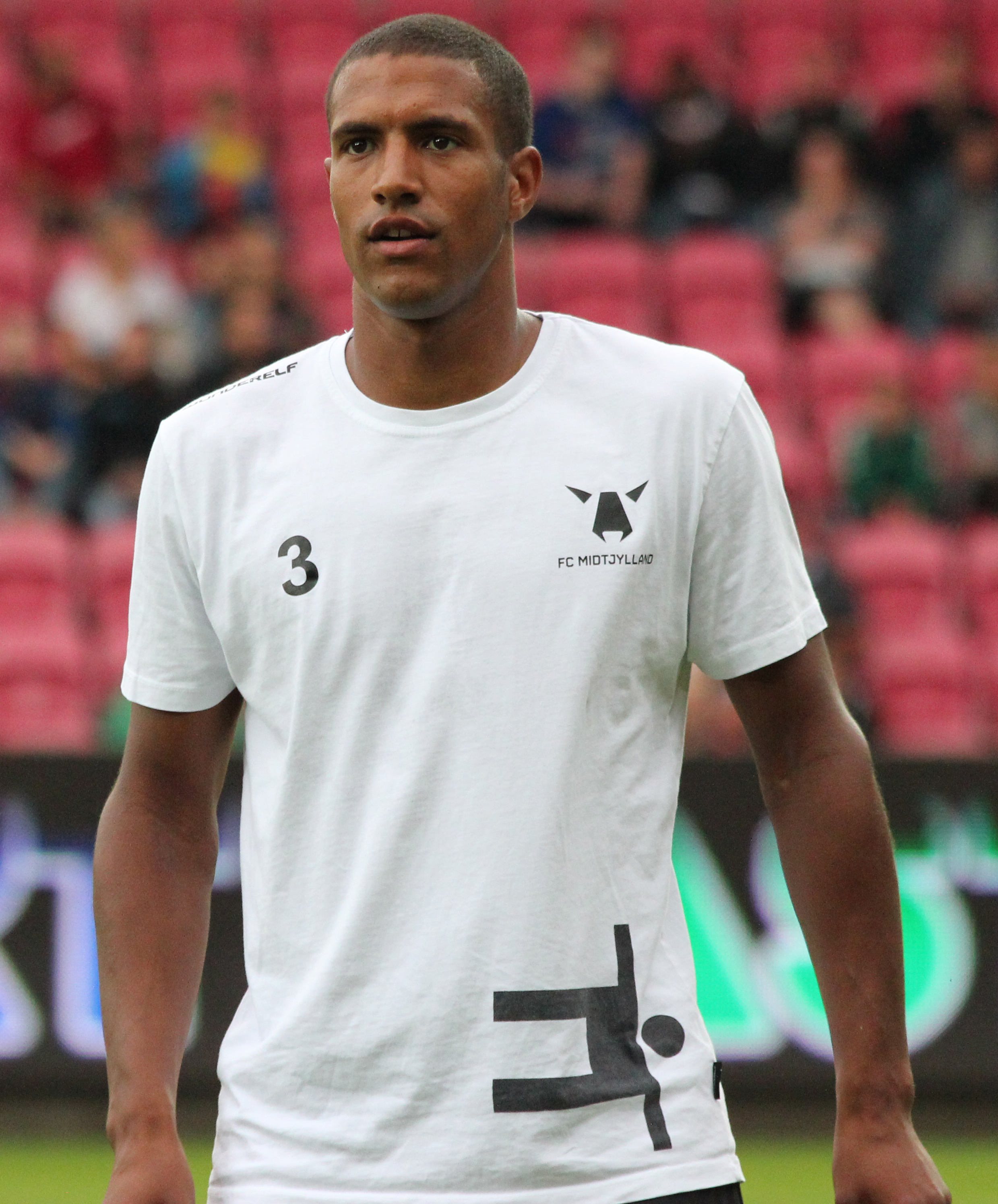 Kolja Afriyie varmer op før FCM-FCK 28. juli 2013